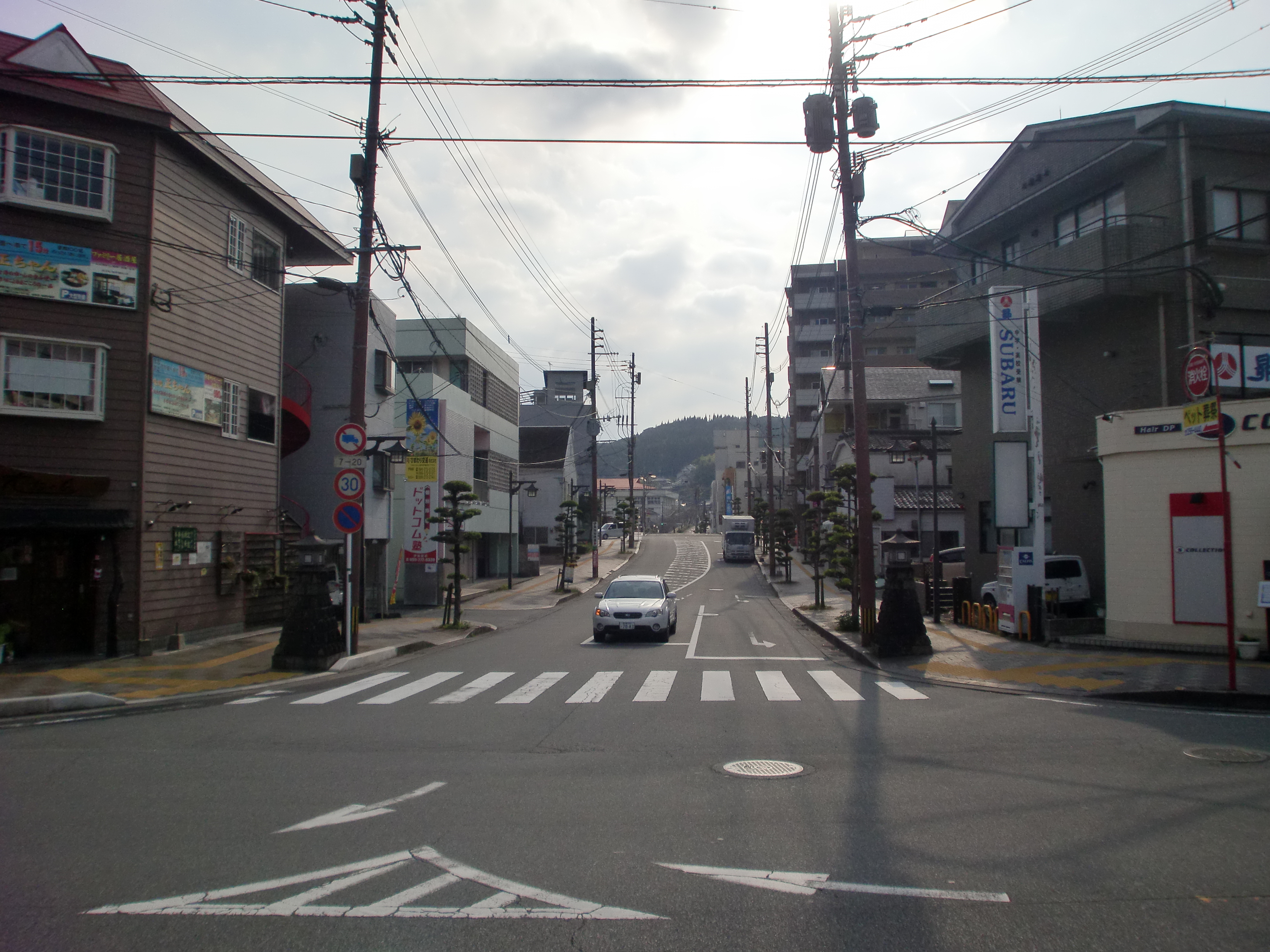 鹿児島県道301号伊集院停車場線を伊集院駅前の終点から起点方向を望む。